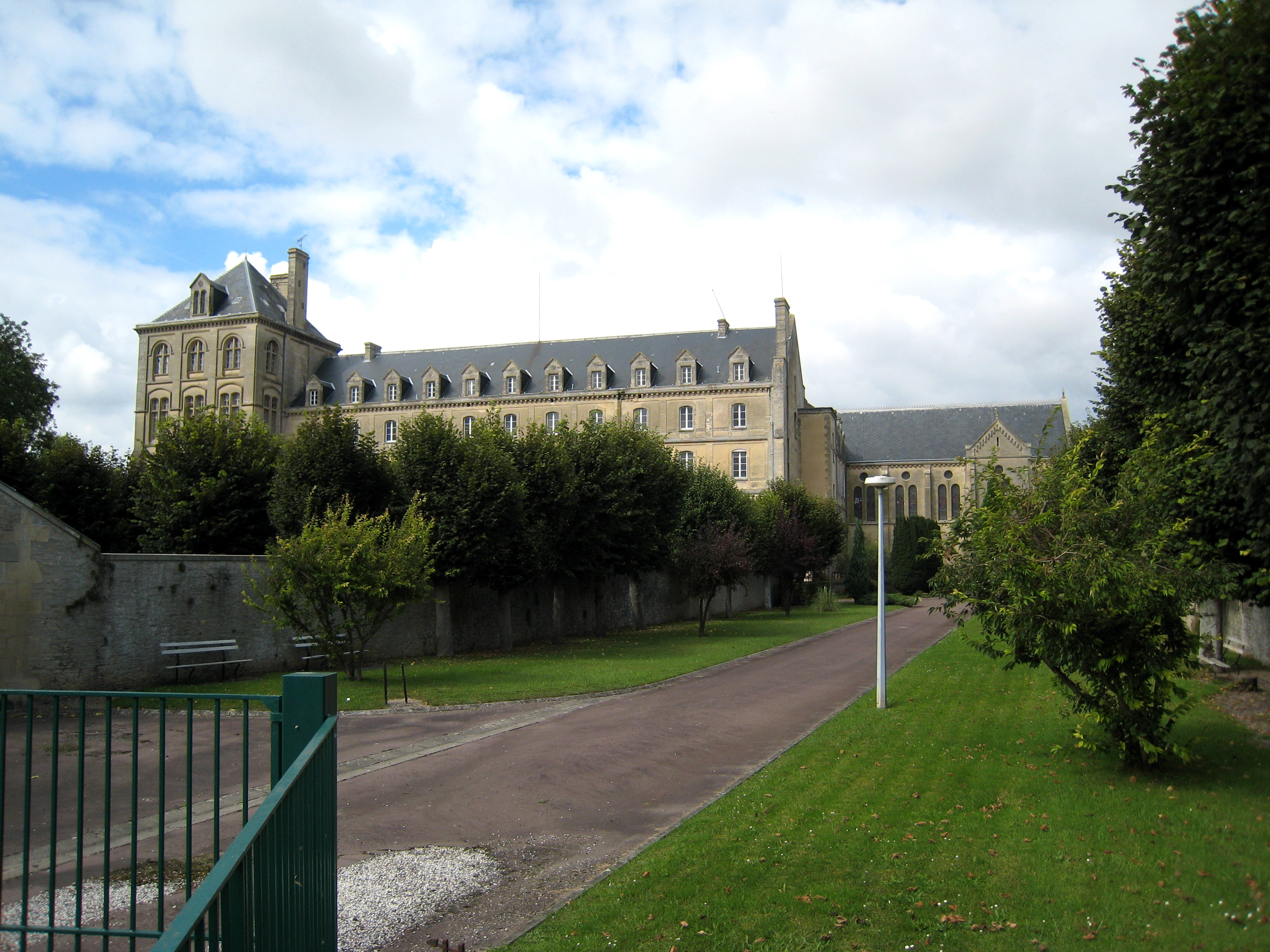 Ancien séminaire de Villiers le Sec, Calvados, France